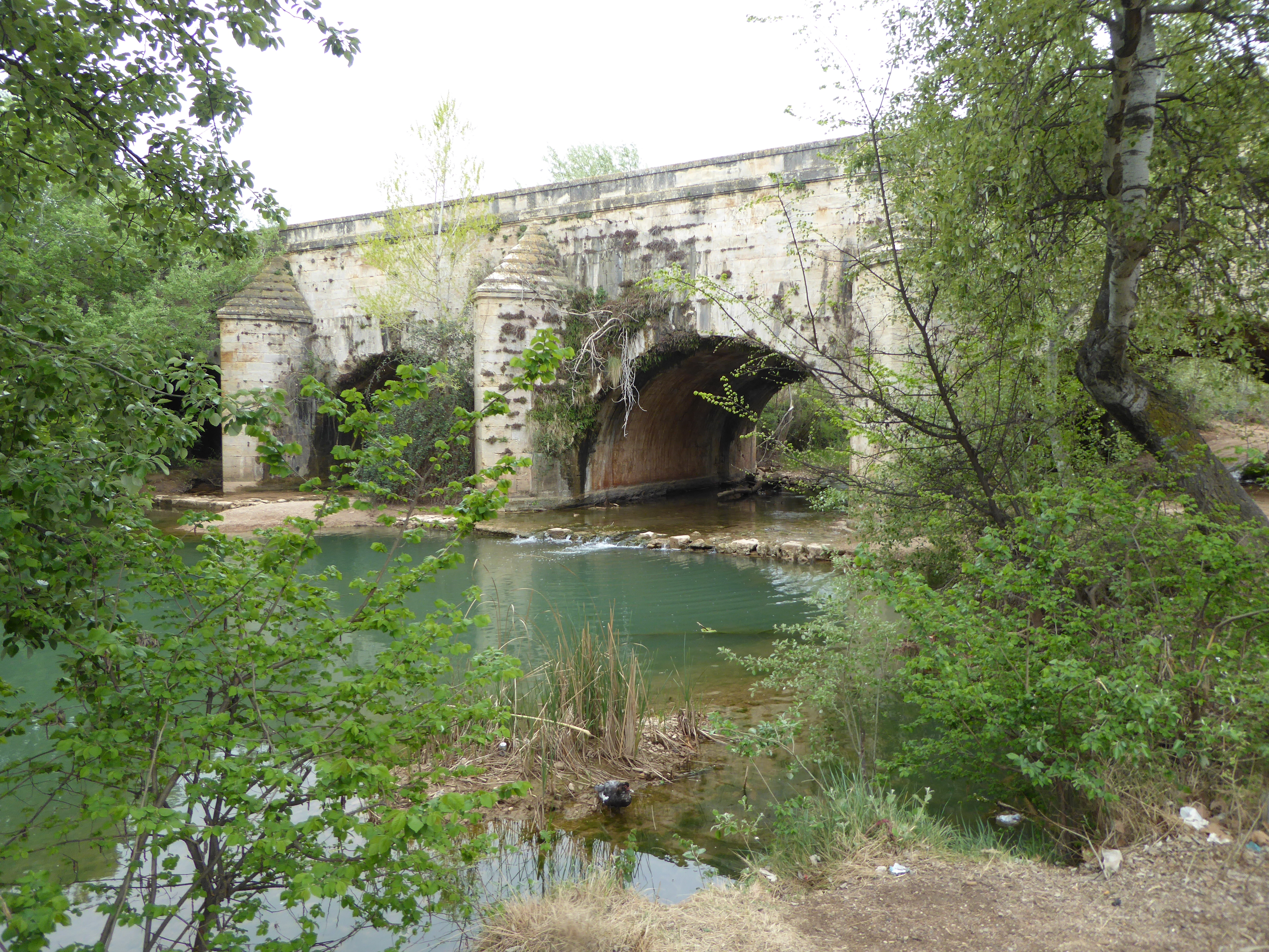 Grisén